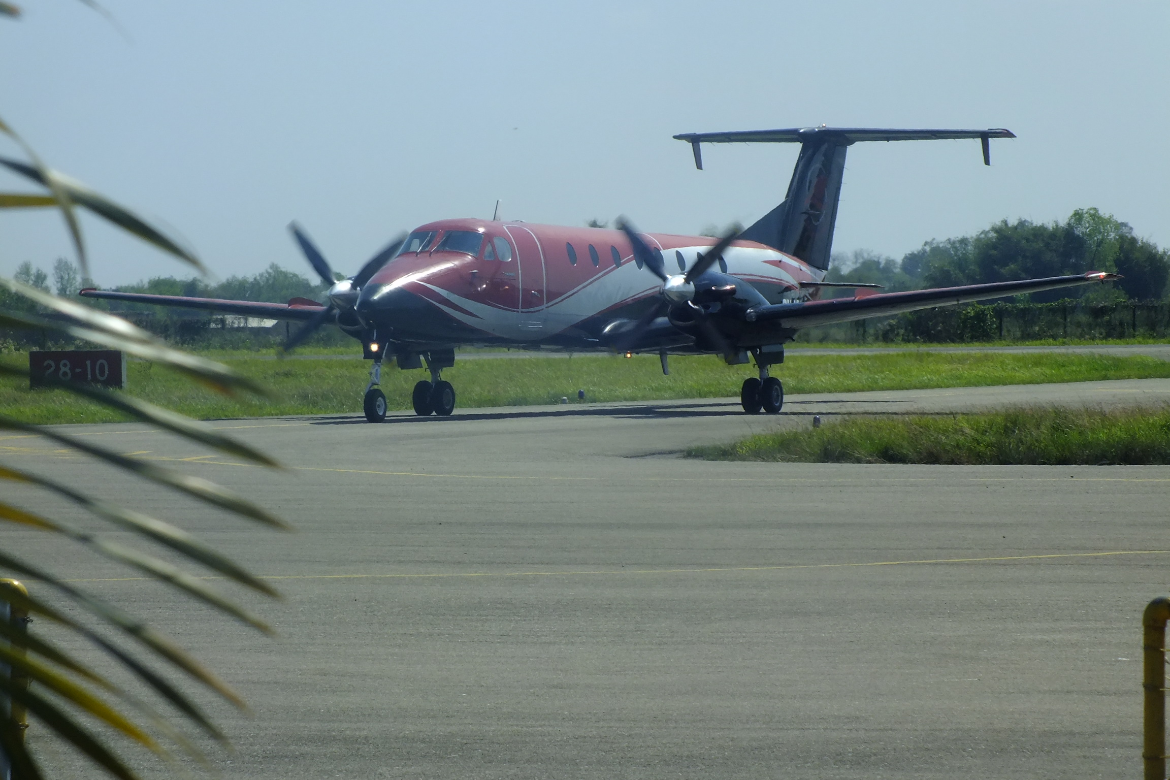 2015-03-17 Beechcraft 1900C Simrik Airlines・Gautam Buddha Airport 9N-AGI (aircraft)